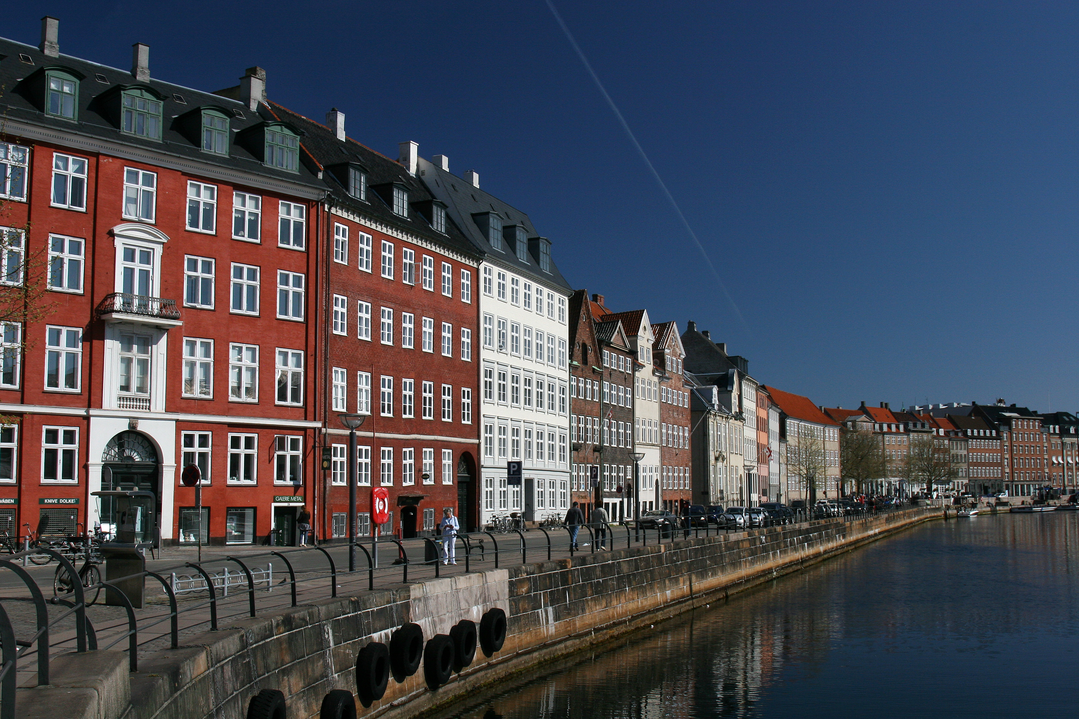 Nybrogade and Gammel Strand in Copenhagen, Denmark